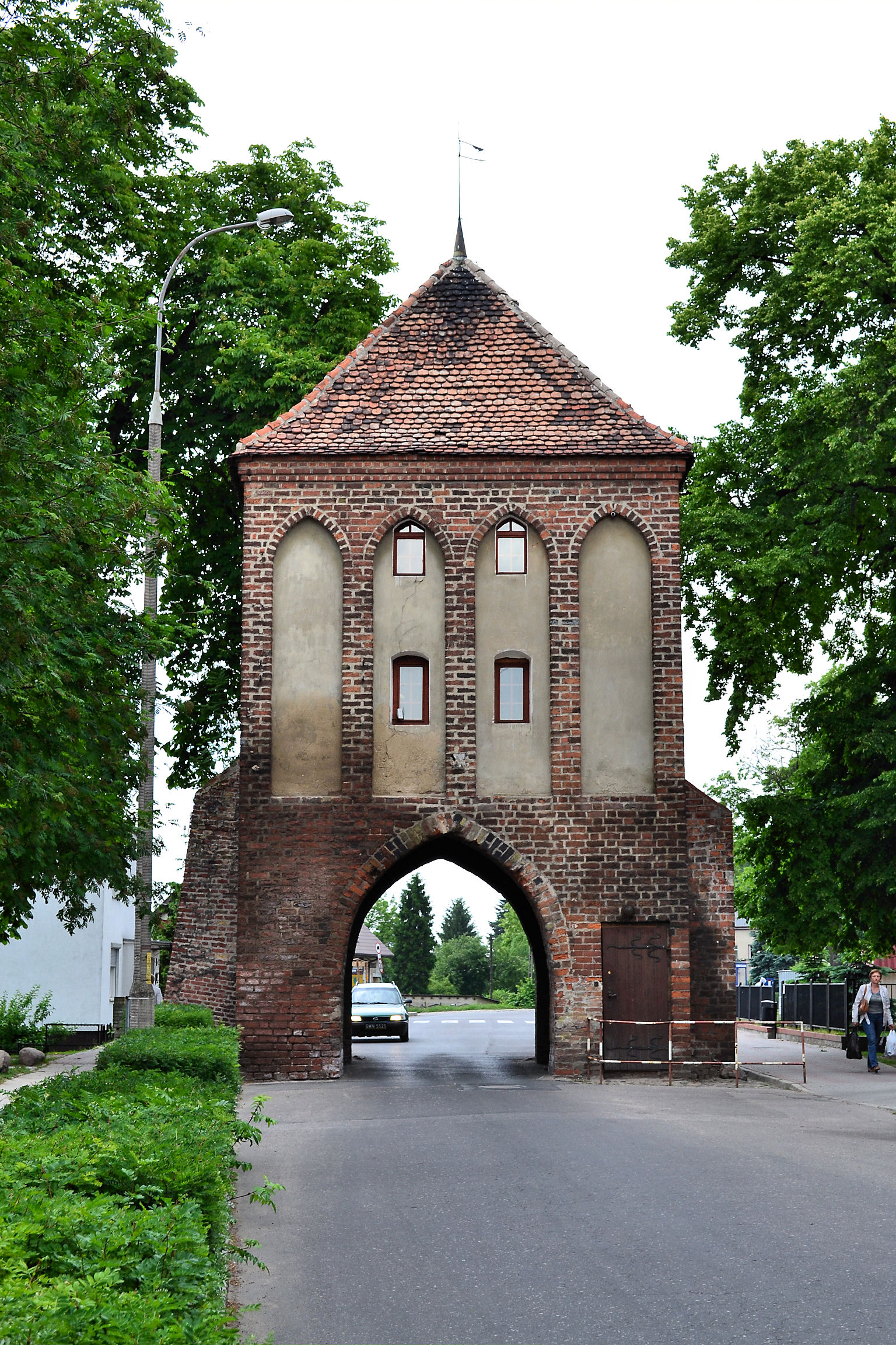 Myślibórz - Brama Pyrzycka